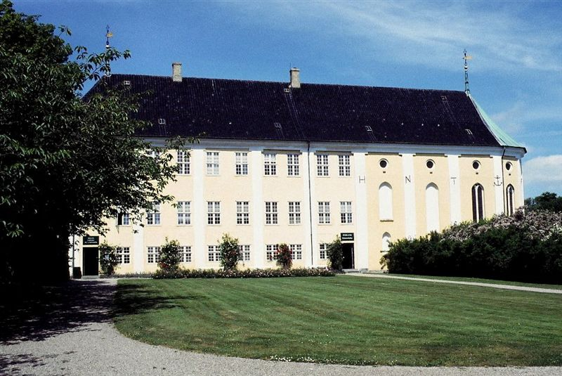 Gaunø slotskapel i Danmark. Gavnø slot set fra syd